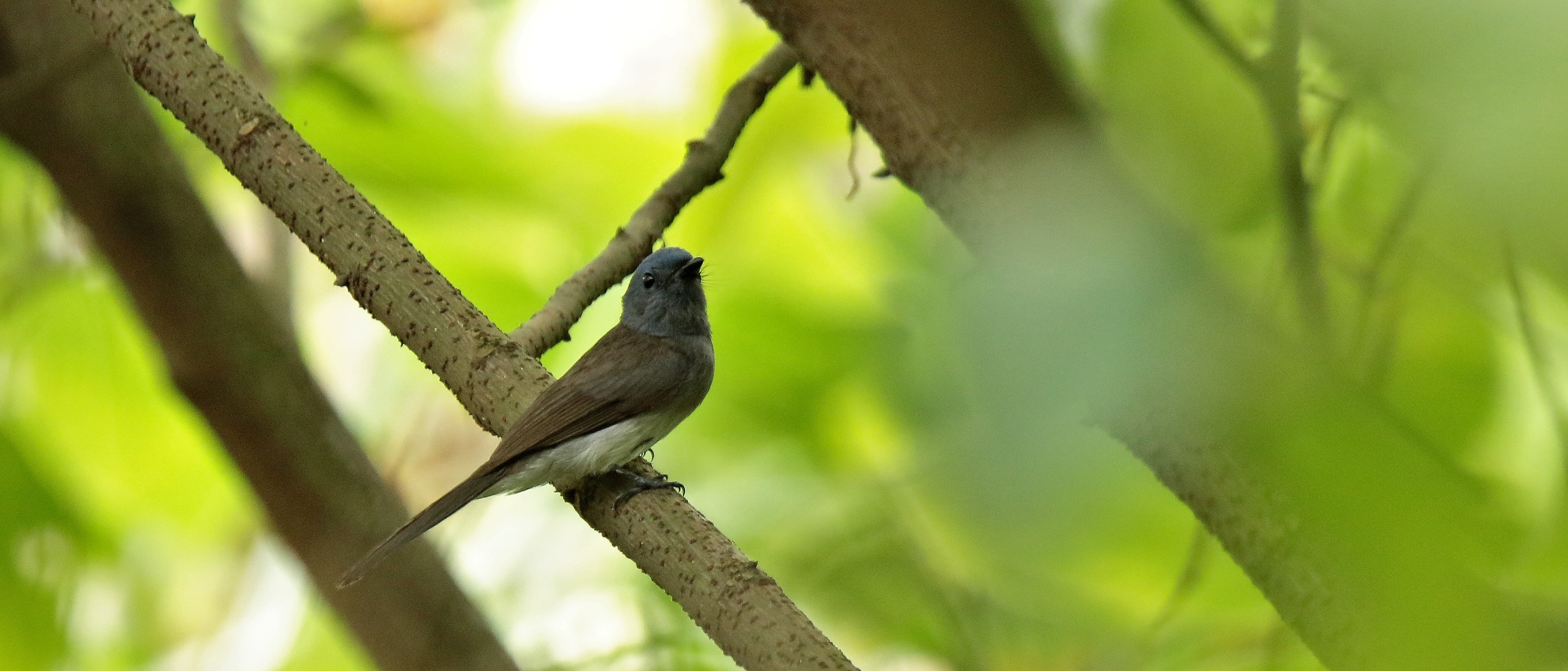 Black-naped monarch (femal)